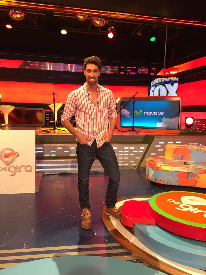 Tomás Fricher en los estudios Fox